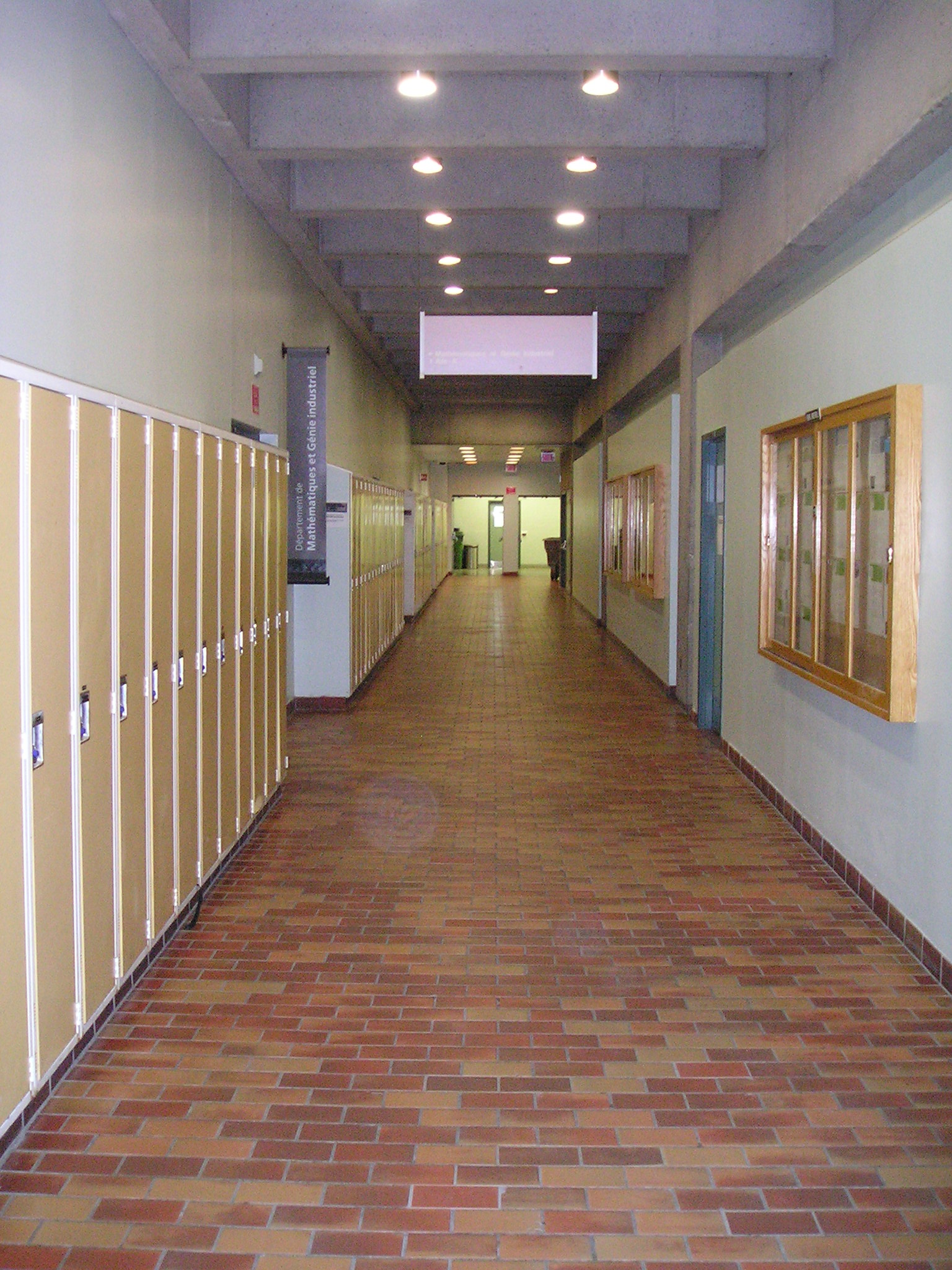 Corridor at Ecole Polytechnique de Montreal